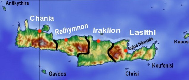 Kreta mit Prefekturen, deren Hauptorten und umliegenden Inseln Modifizierter Ausschnitt aus der Datei file:Griechenland topo.jpg